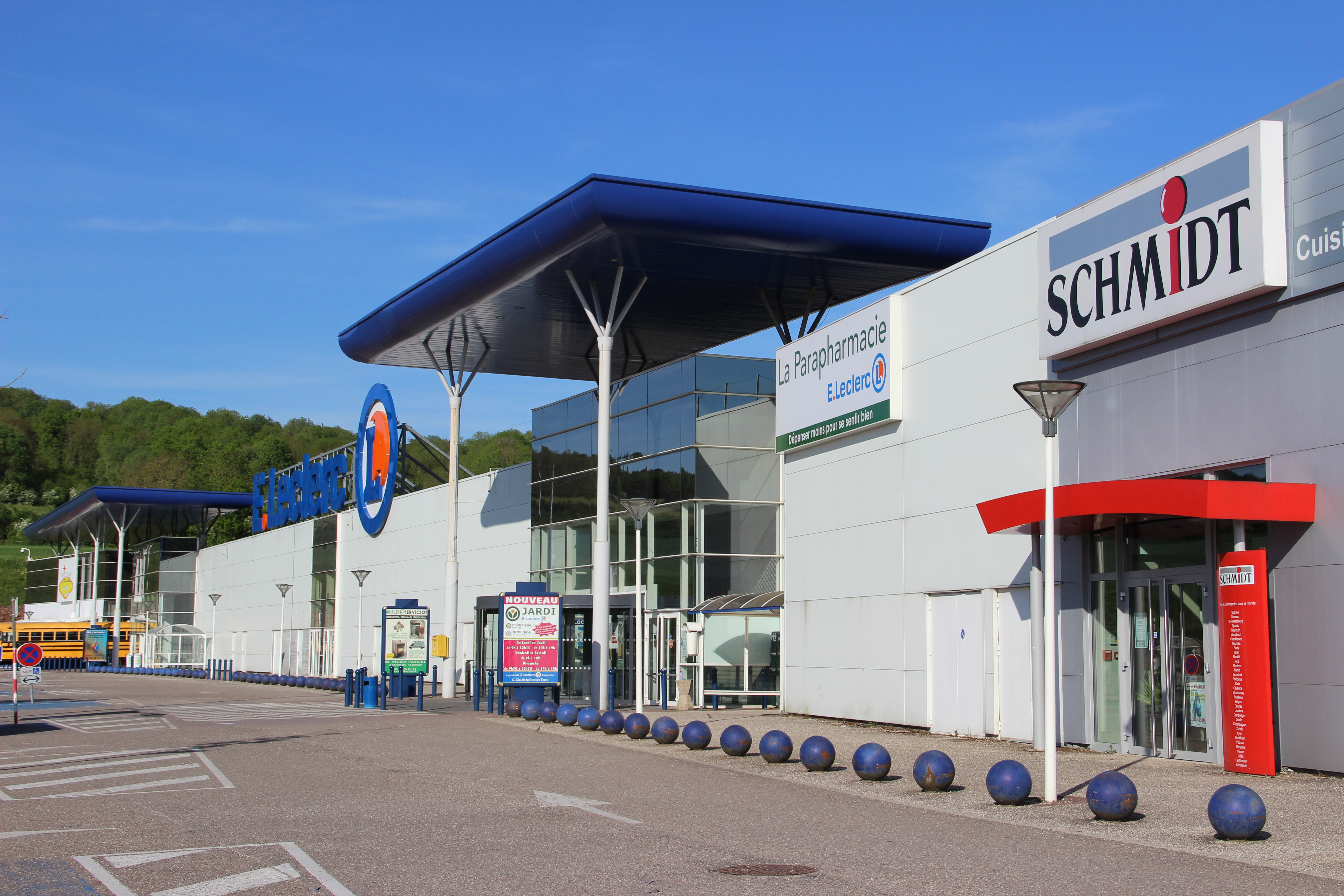 Centre Commercial E.Leclerc à Bar-le-Duc (ZAC de la Grande Terre)